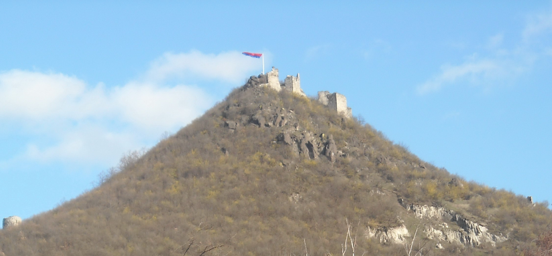 Остаци средњовековне Звечанске тврђаве.